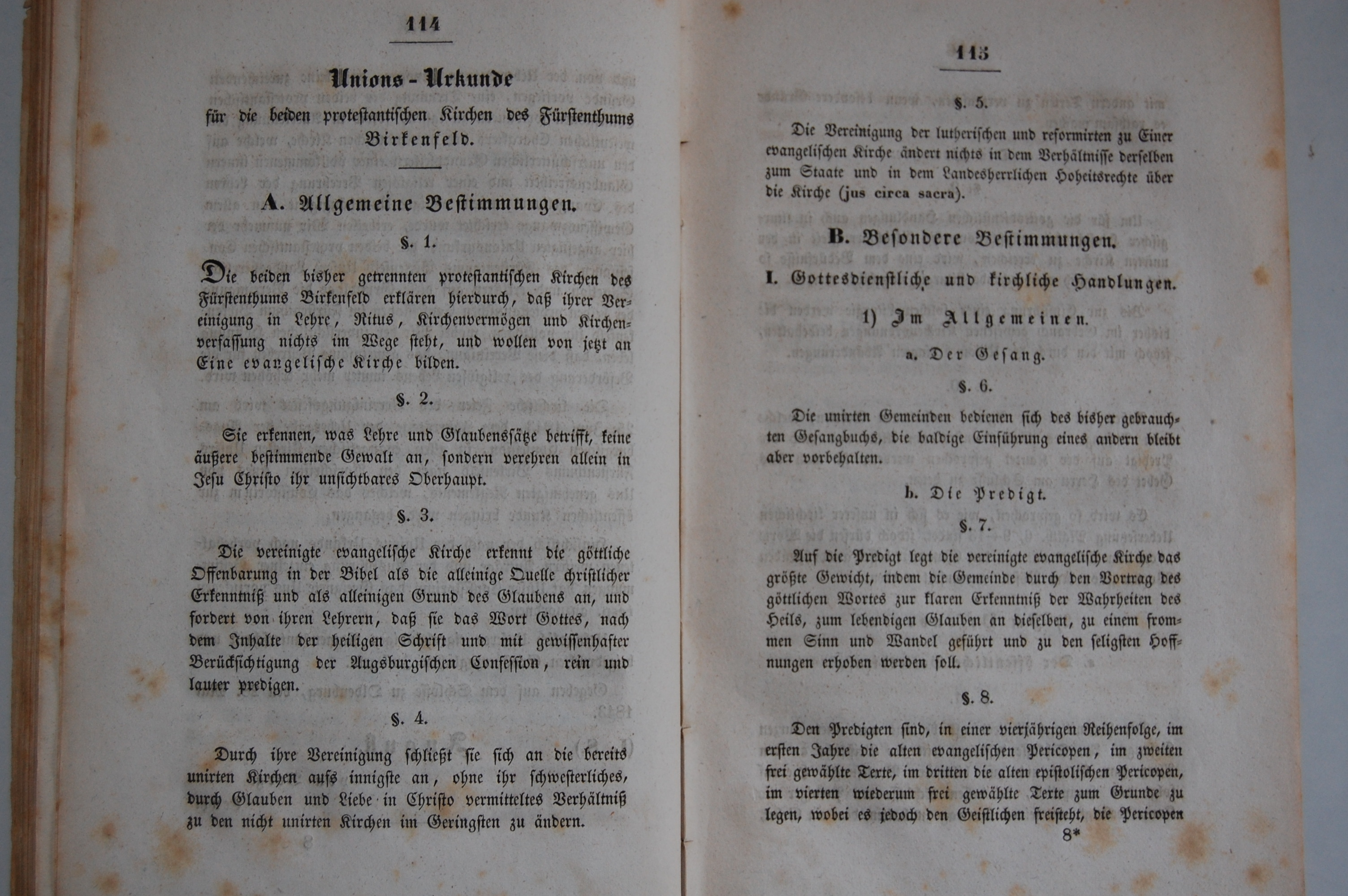 Unions-Urkunde der evangelischen Kirchen im Fürstentum Birkenfeld